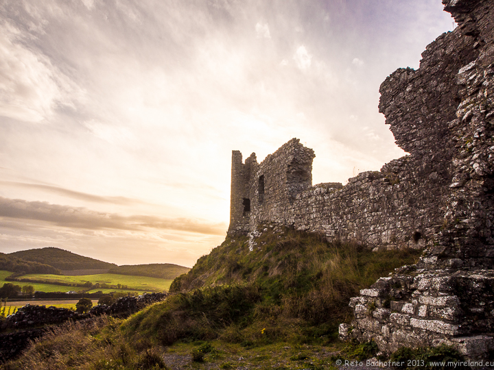 Dieses Bild entstand an einem wunderschönen Herbstabend auf dem Rock of Dunamase, Co. Laois